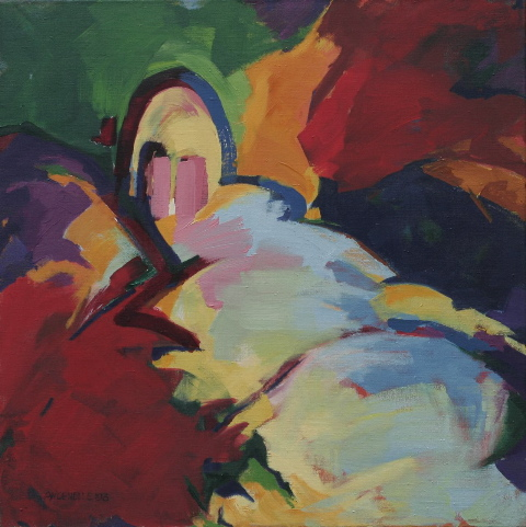 Camino de Mnquiri